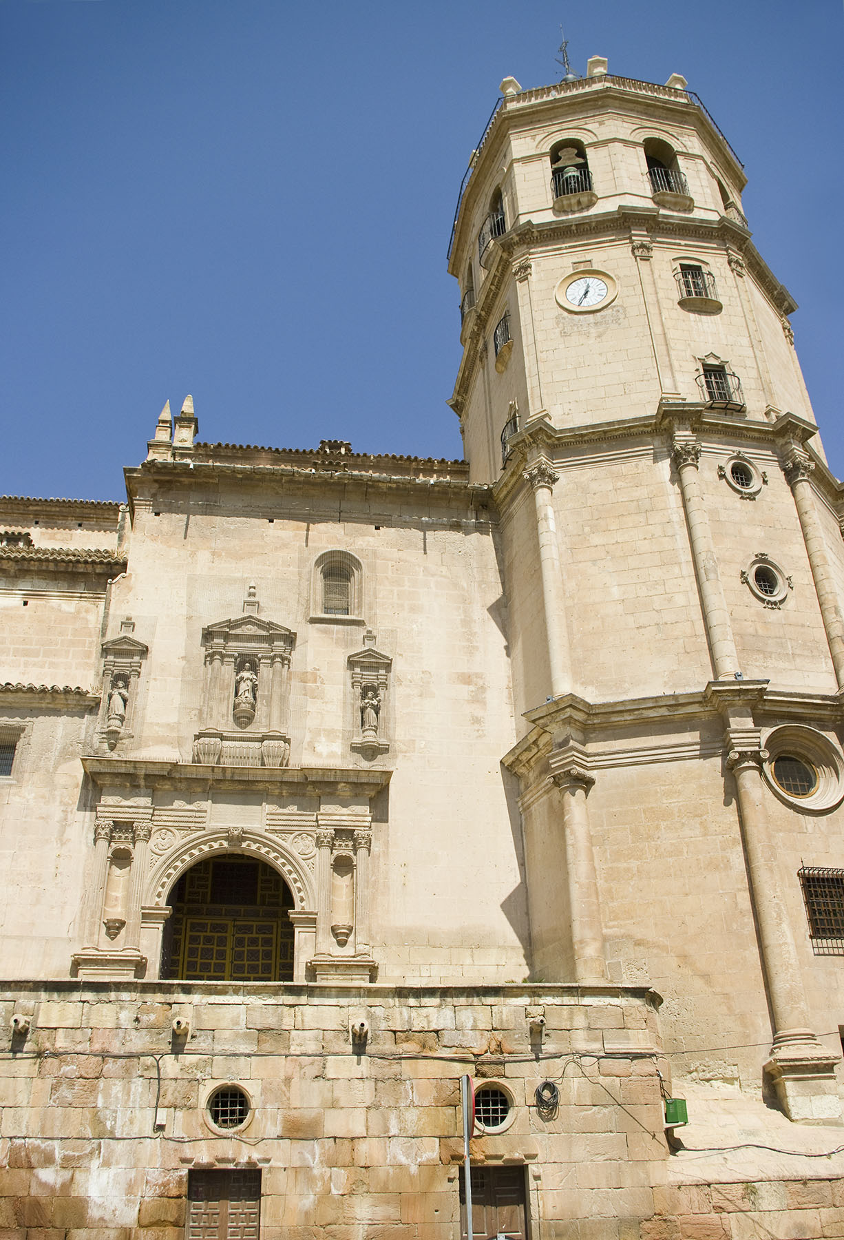 Portada del Carrerón de la Colegiata de San Patricio de Lorca (Murcia)